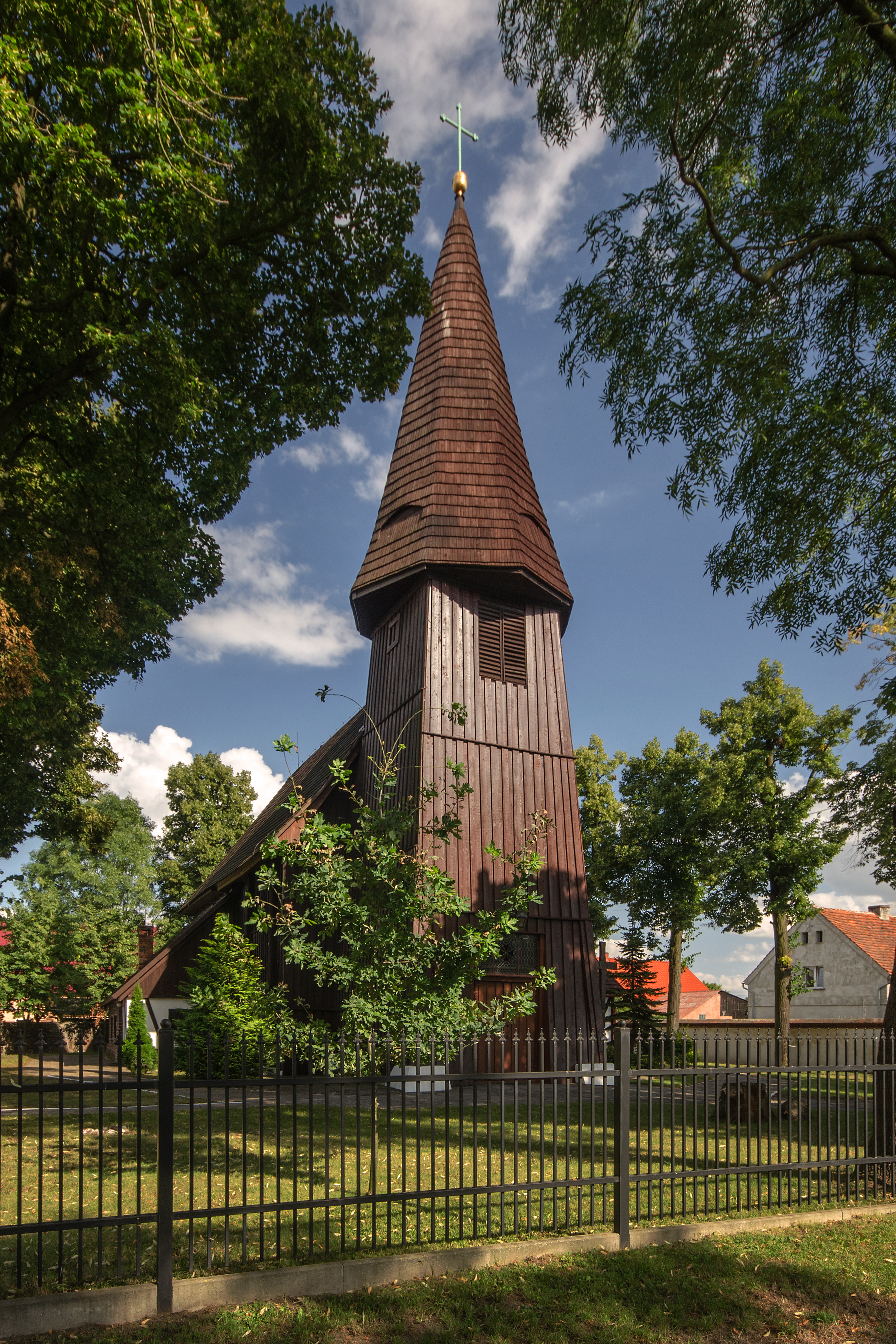 Krzyżowice - rzymskokatolicki kościół filialny p.w. Wniebowzięcia NMP, XV, 1580, XVII